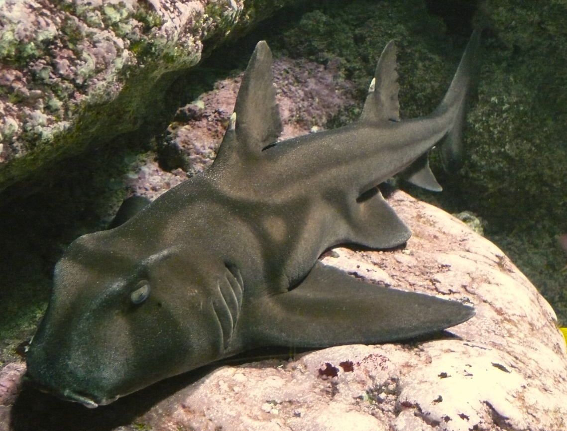 ryba